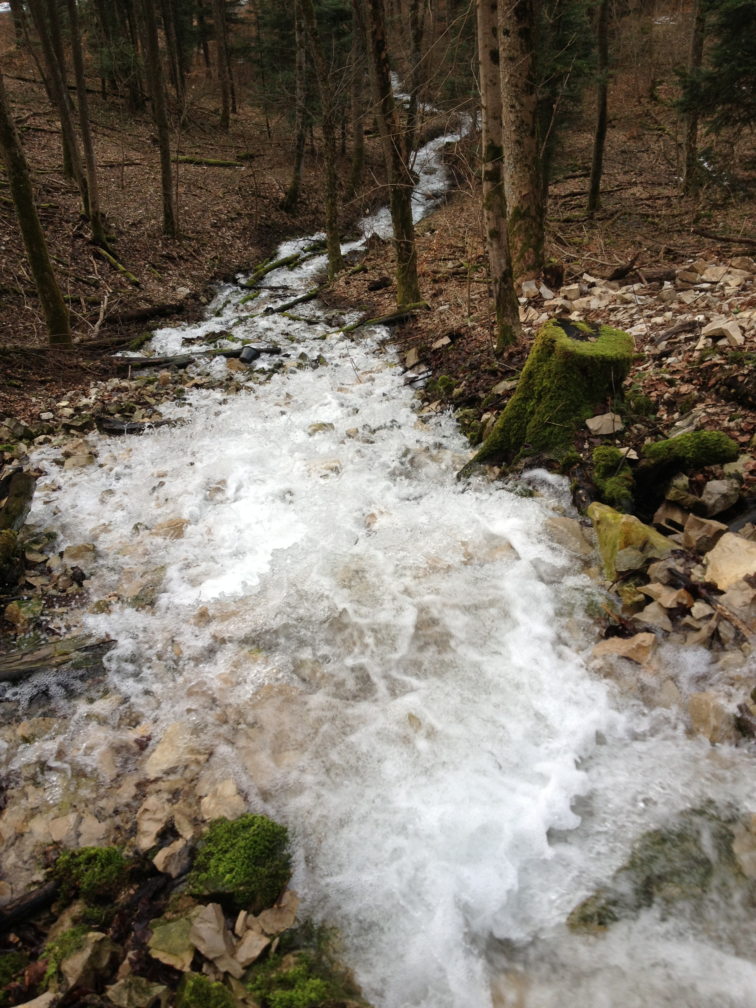 Periodische Quelle (Bröller) des Zellerbachs am Albtrauf oberhalb von Mariazell, dessen Wasser über den Reichenbach und die Starzel in den Neckar fließt